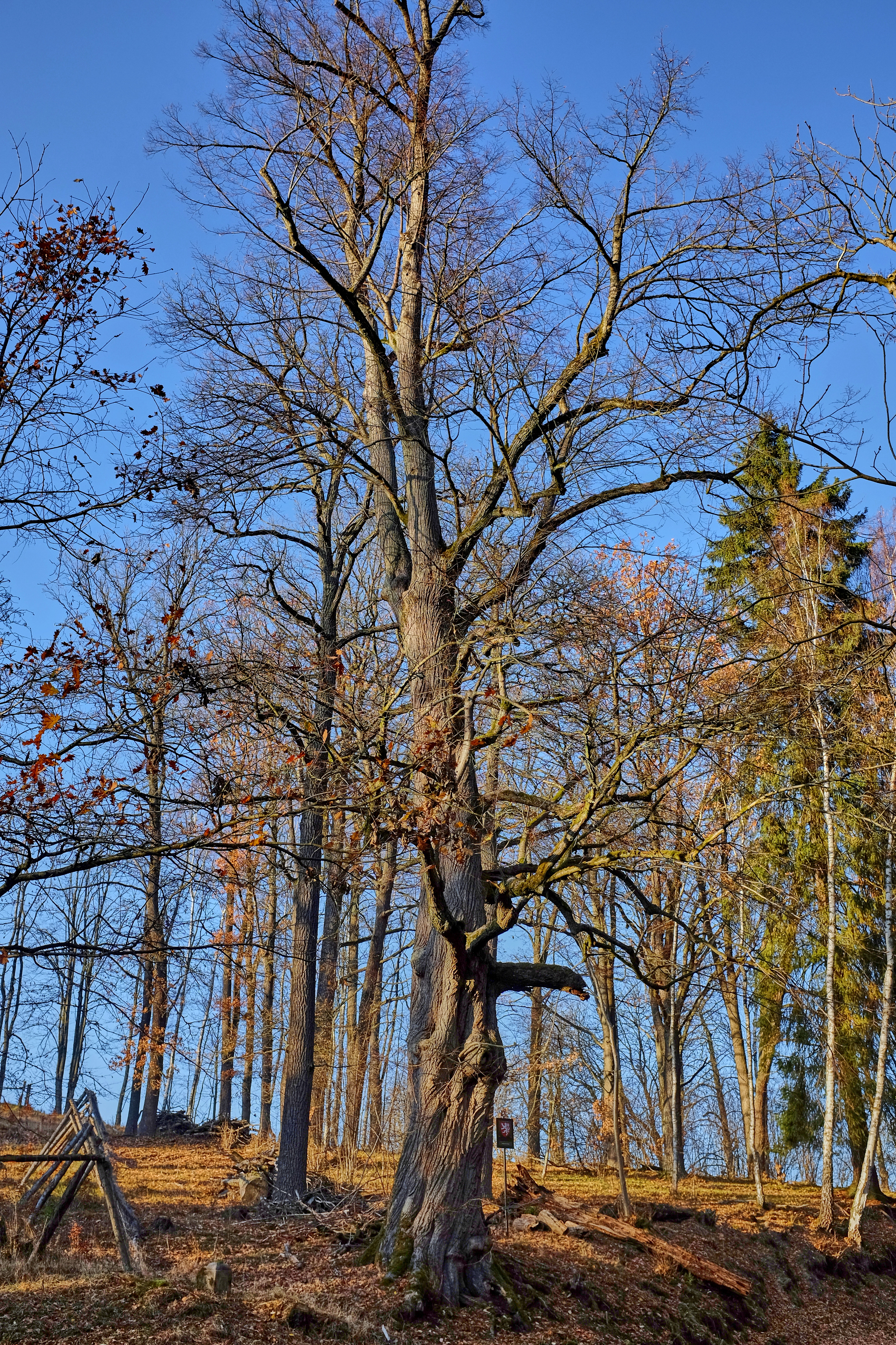 Památný strom - Lípa v Krásné Lípě, okres Sokolov